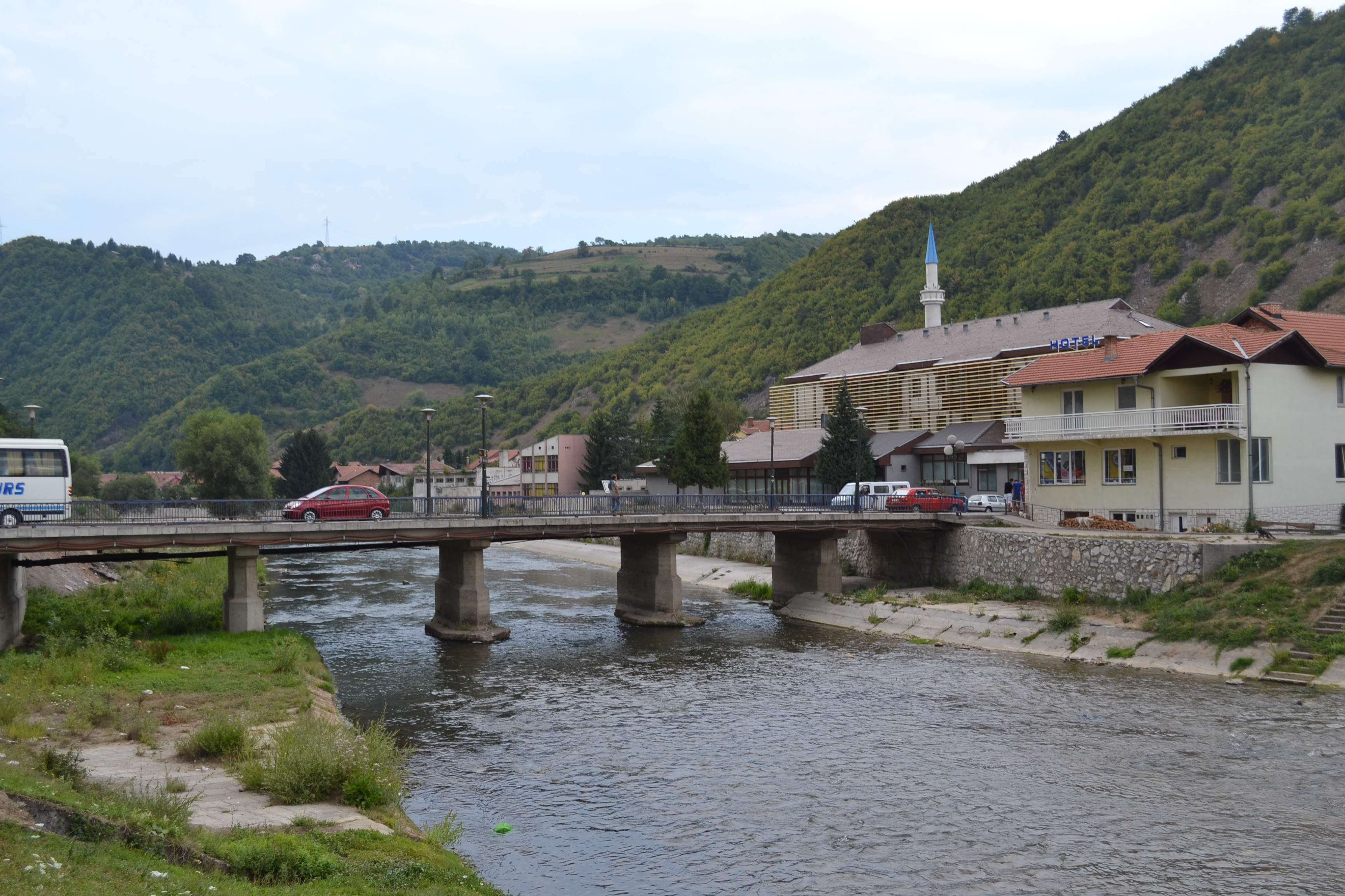 Vrbas u Donjem Vakufu